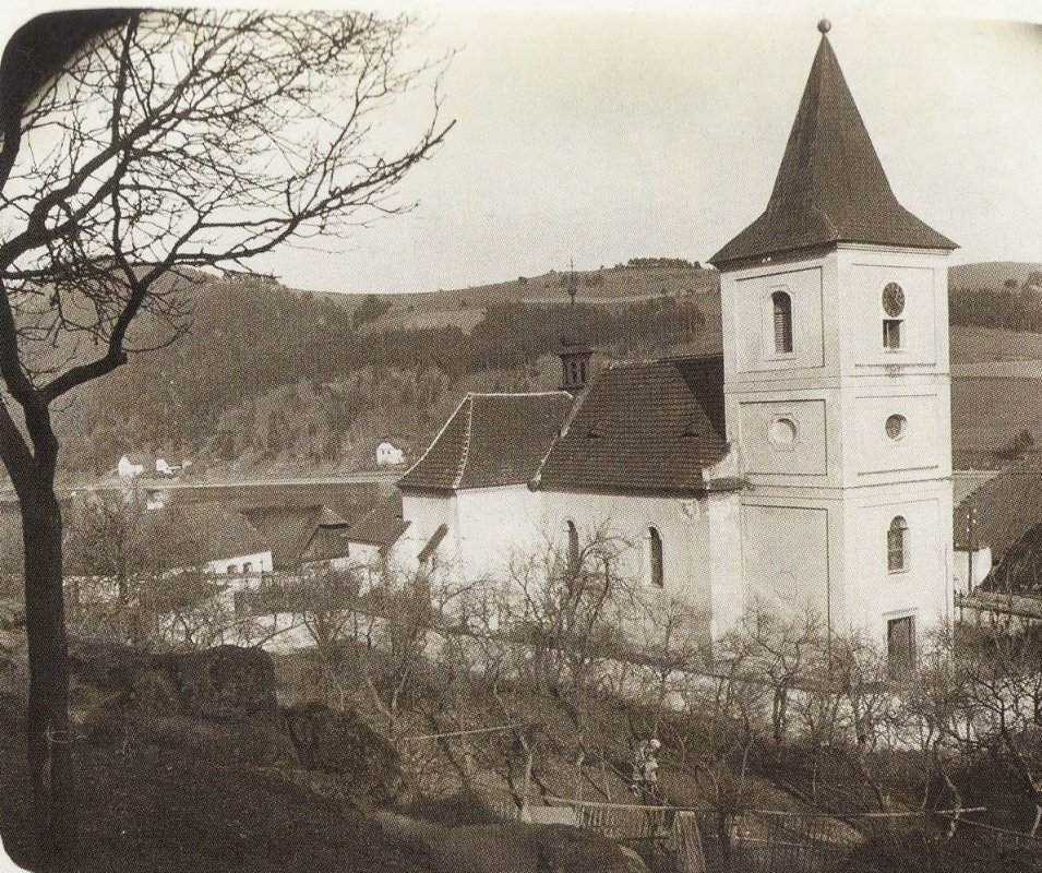 Kostel svatého Štěpána v Těchnicích